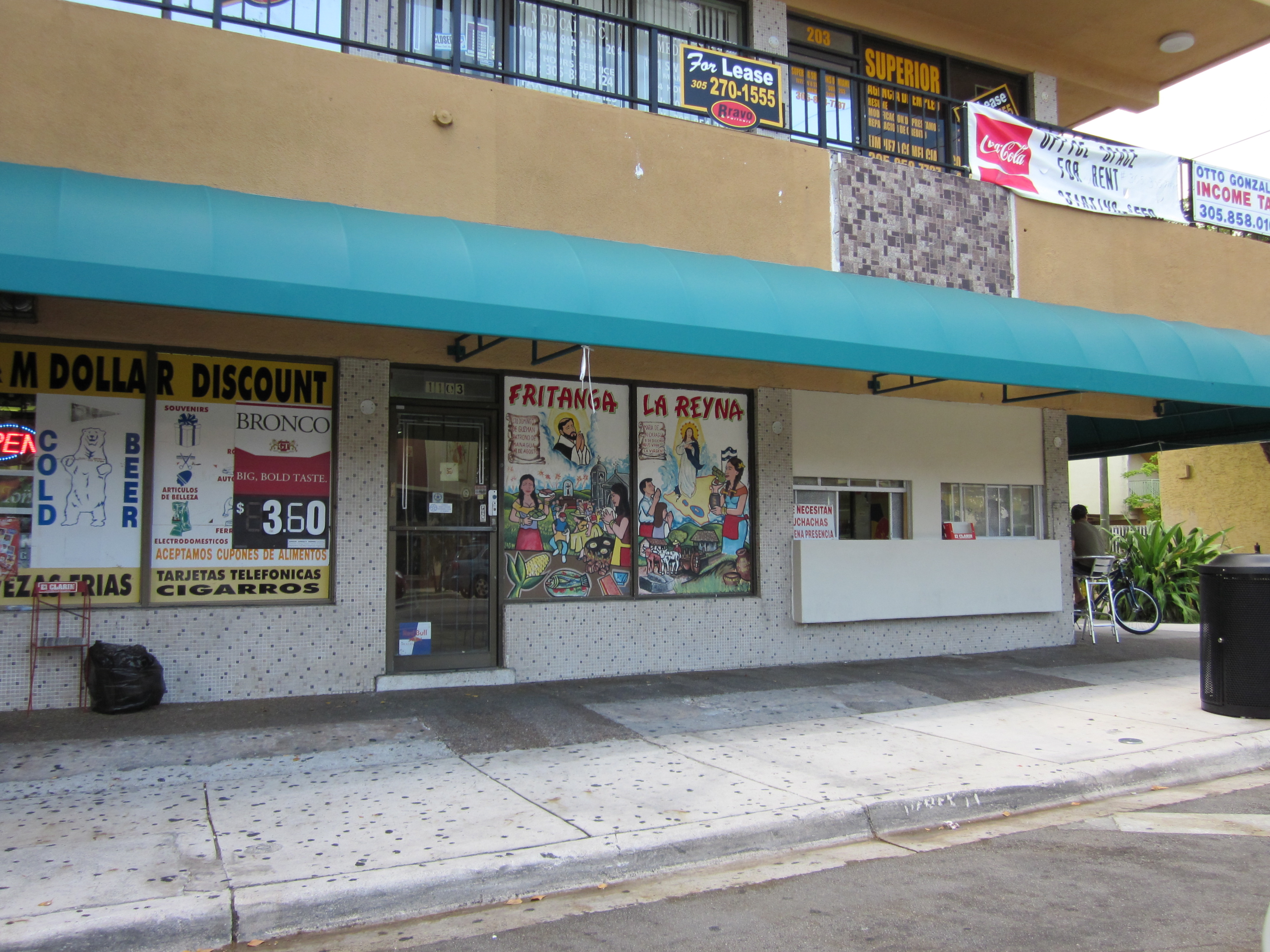 Calle Ocho, Little Havana, Miami Florida.